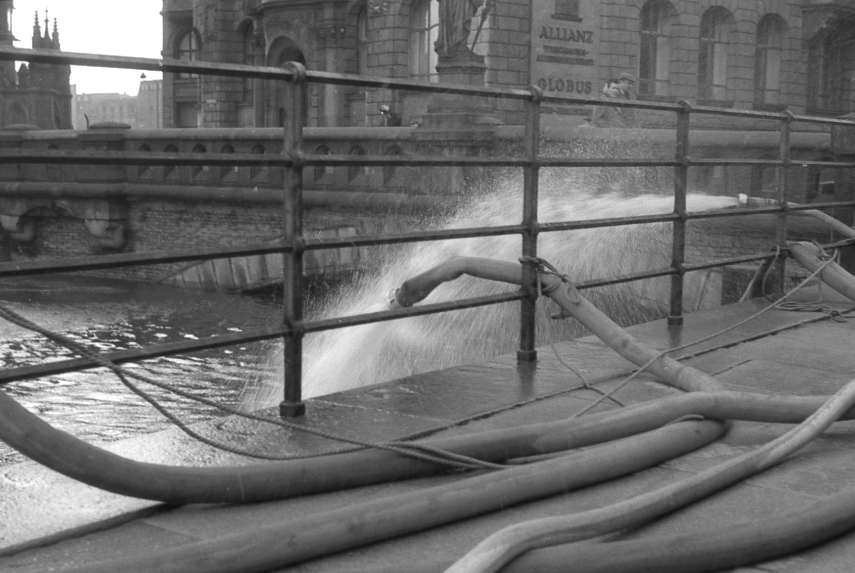 Sturmflut, Trostbrücke und dahinter der Globushof, Pumpschläuche der Feuerwehr